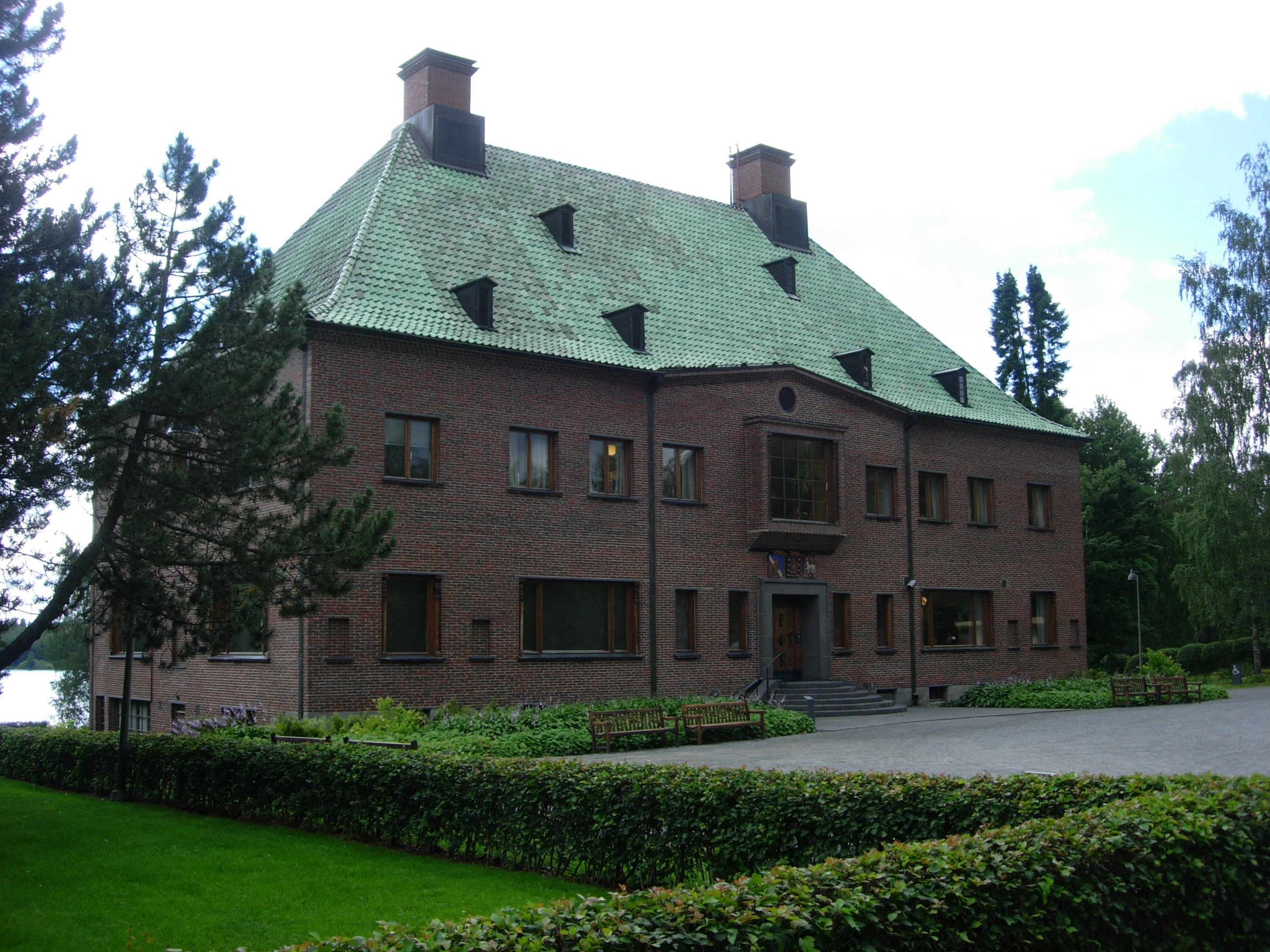 Gösta Serlachiuksen taidemuseo Joenniemen kartanossa. Mänttä-Vilppula. Arkkitehti Jarl Eklundin suunnittelema talo on valmistunut 1935.